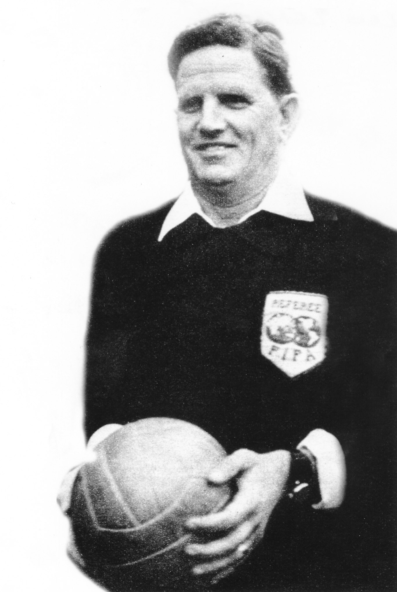 Hrvatski izbornik Leo Lemešić